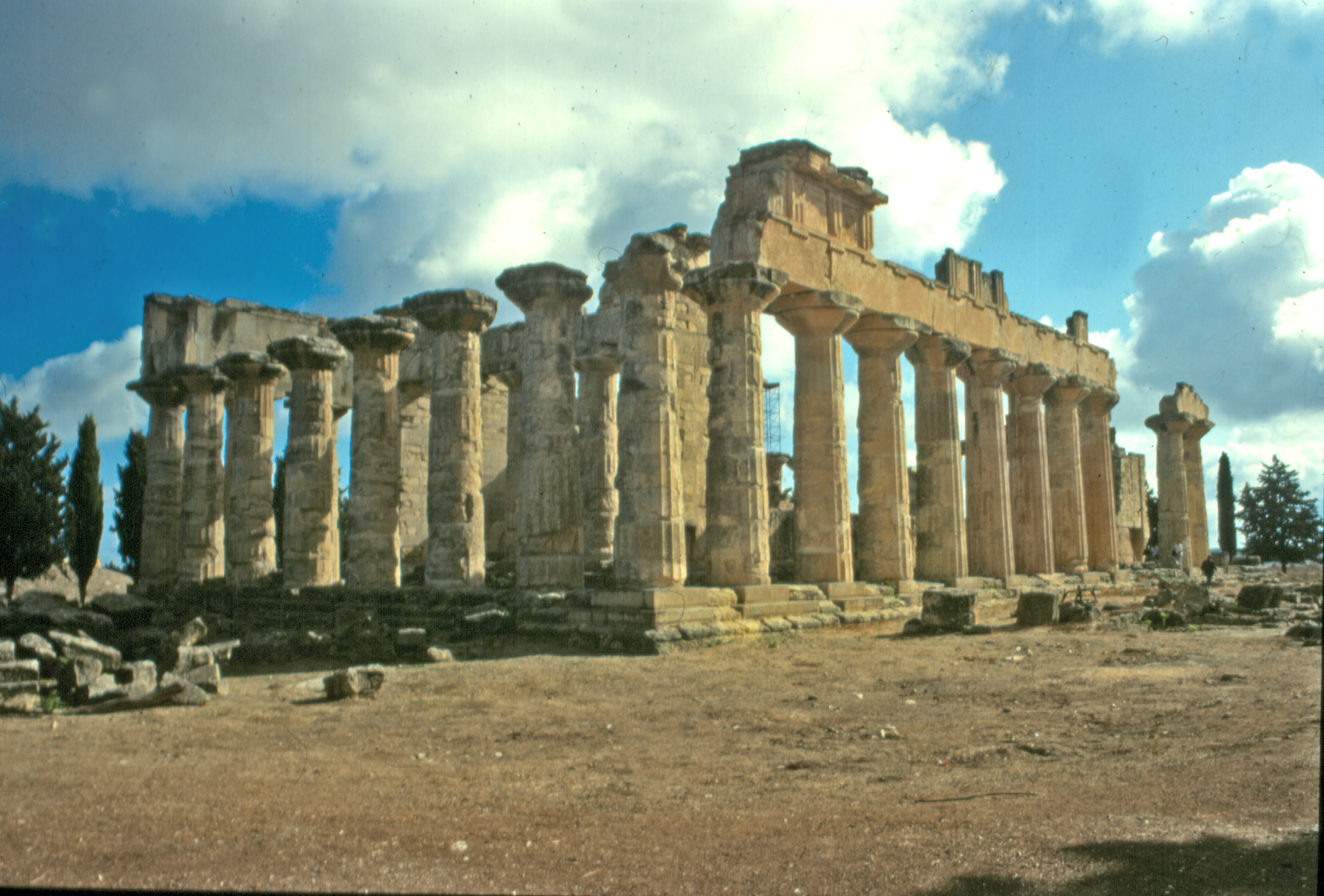 Libia, Cirene (sito archeologico), Tempio di Zeus [1]